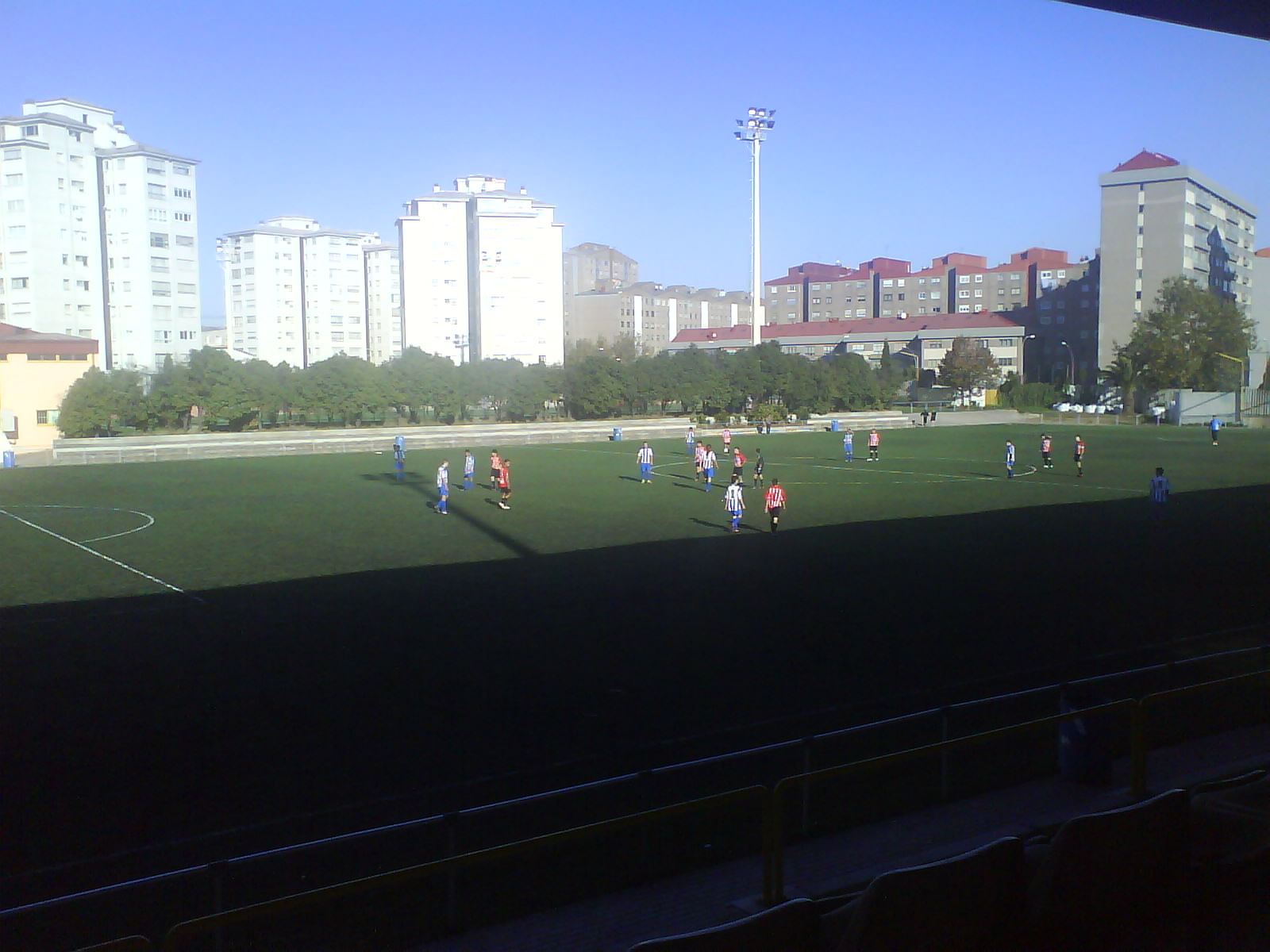 Estadio de Elviña, La Coruña, España